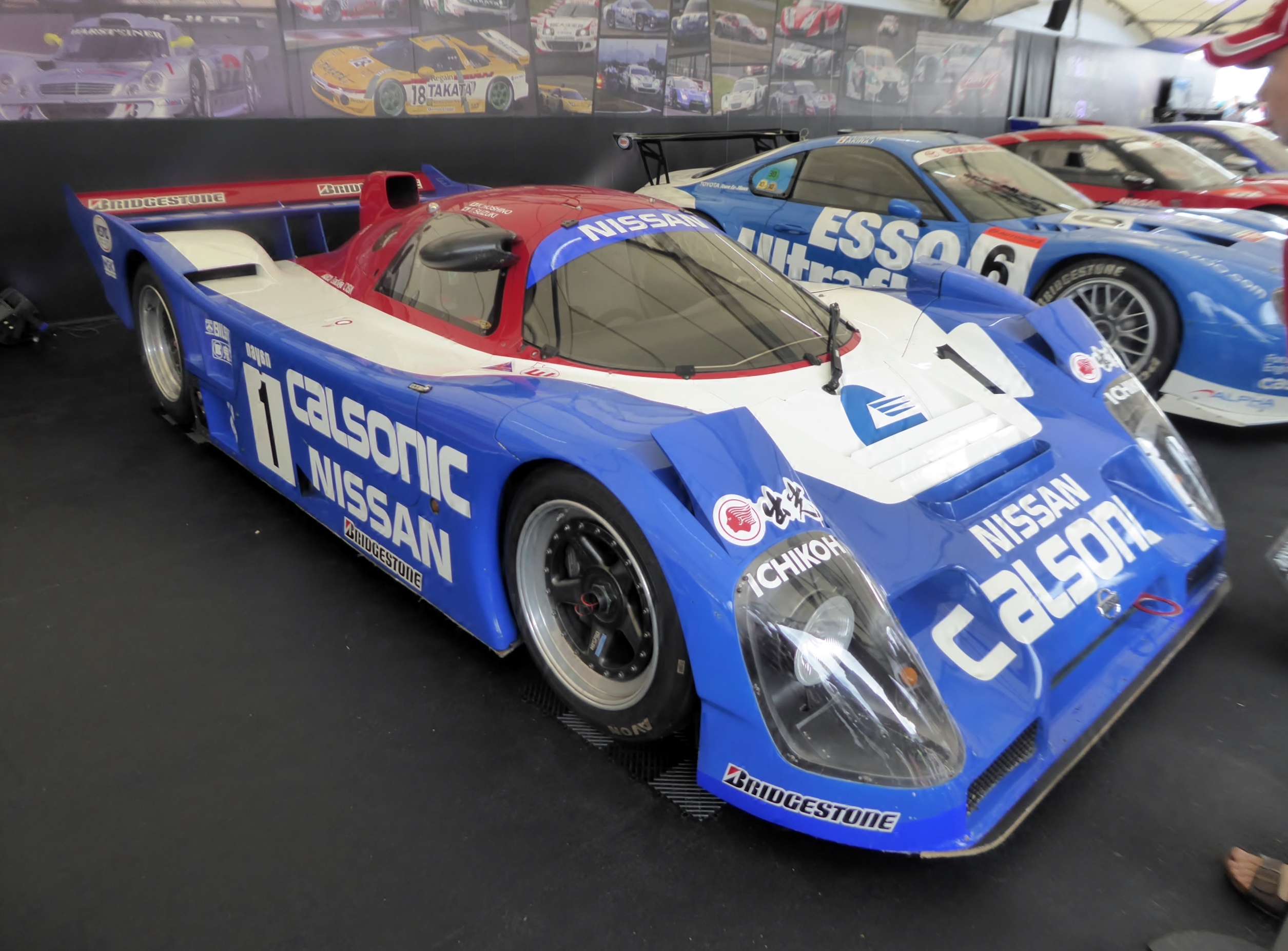 1992年全日本スポーツプロトタイプカー耐久選手権に出場した1号車日産・R92CPを撮影。